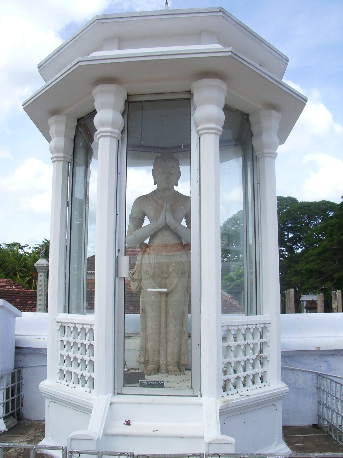 estatua a la gran pagoda d'Anuradhapura, foto feta per J. Ollé el juliol del 2006